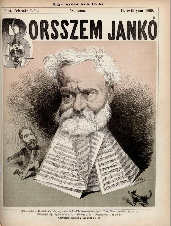 Borsszem Jankó, 1869. február 7. 58. szám